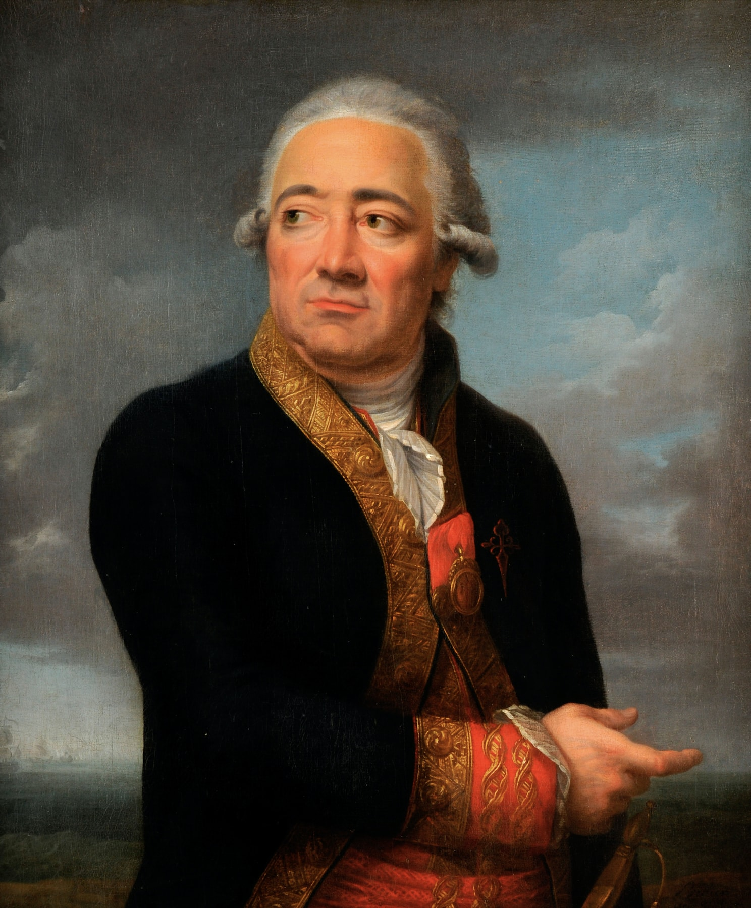 Retrato de José de Mazarredo Salazar (1745-1812), que fue un destacado marino español de los siglos XVIII y XIX, teniente general de la Real Armada Española y caballero de la Orden de Santiago.